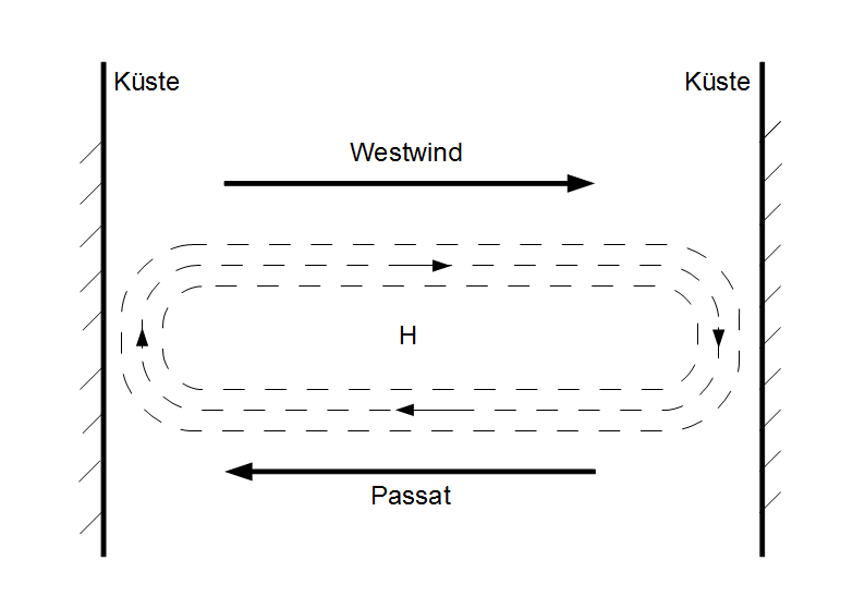 Schema der Verformung eines zonalen Hochdruckrückens im Ozean unter dem Einfluß von Kelvin-Wellen